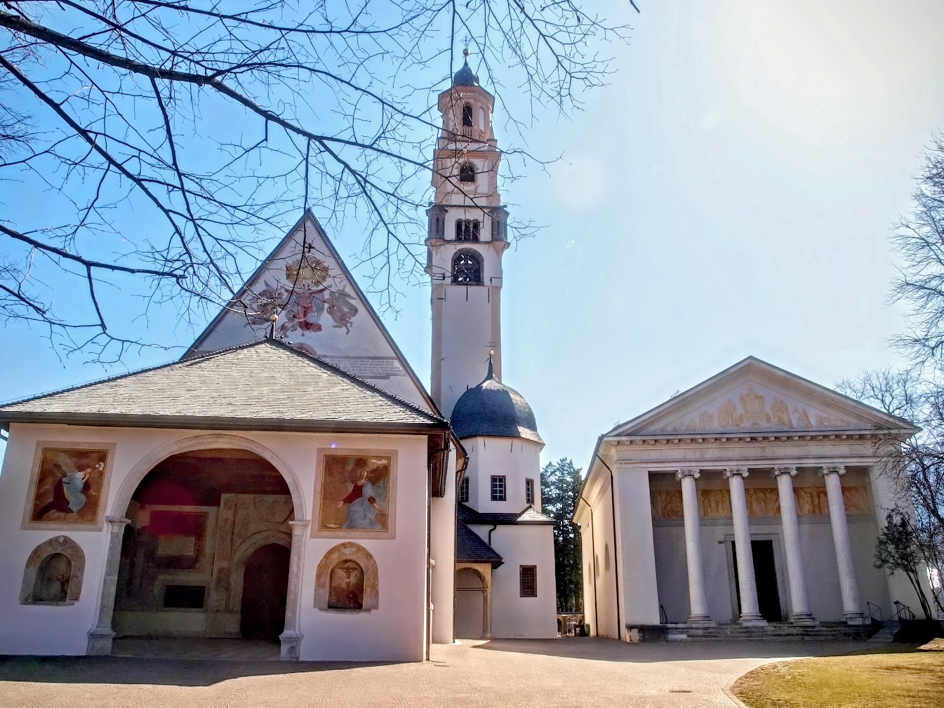 Cavalese